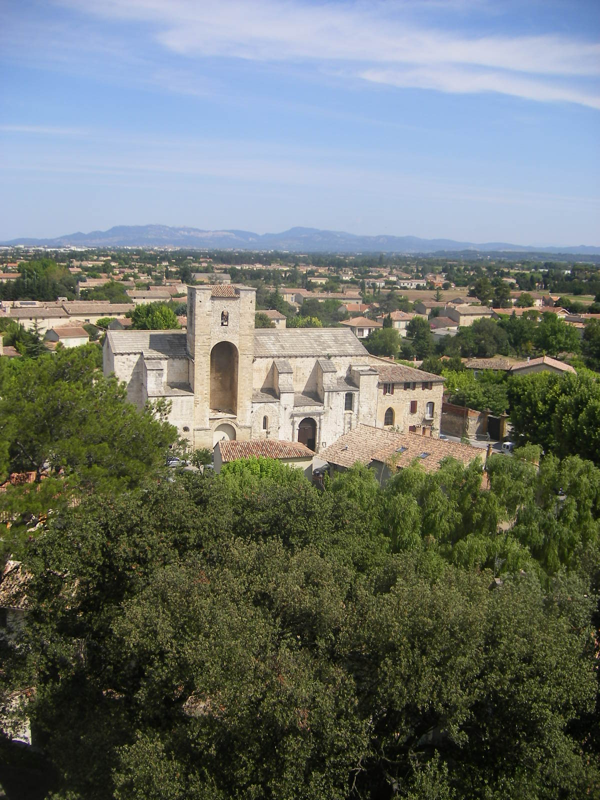 Pernes-les-Fontaines